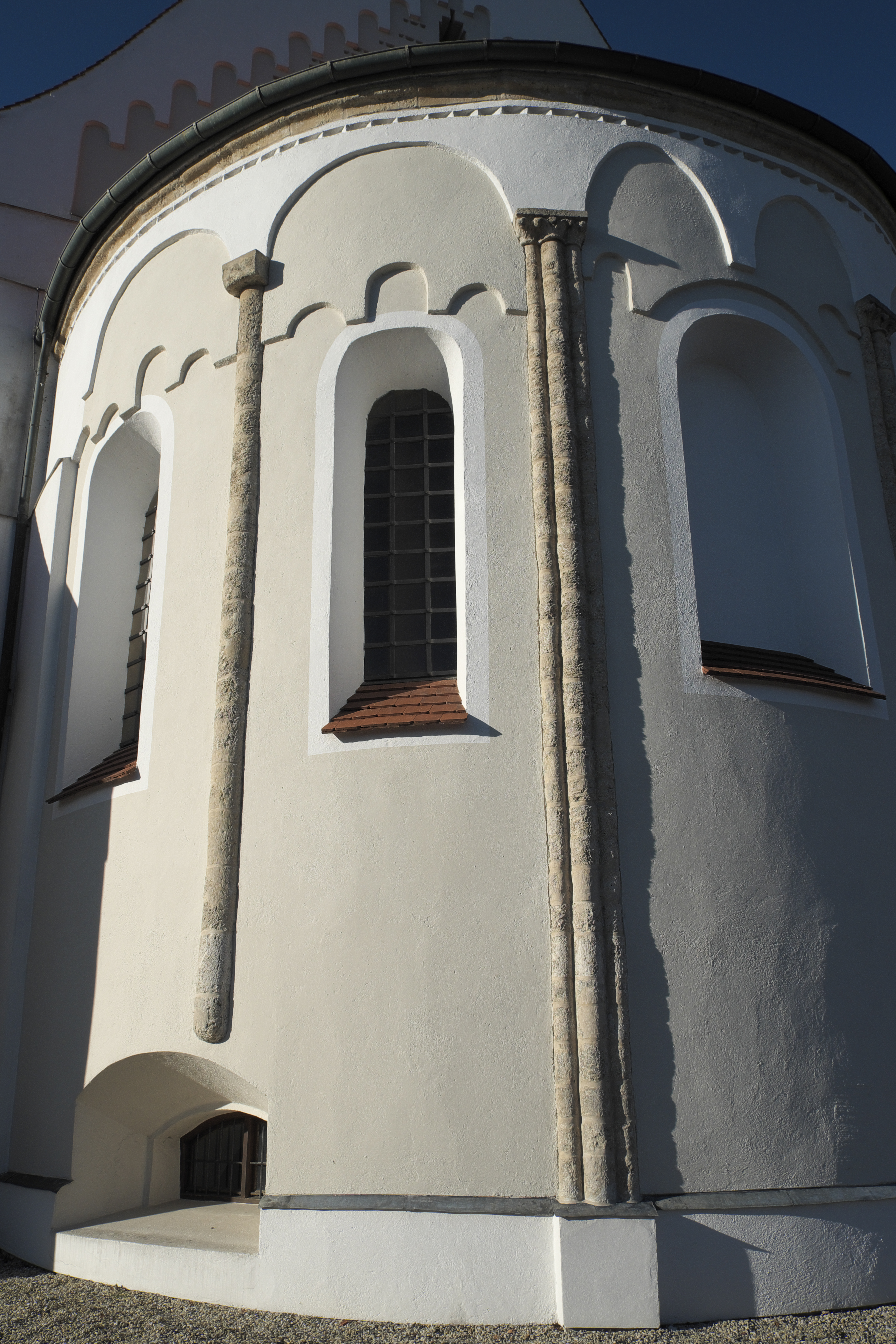 Katholische Pfarr-, ehemalige Kollegiatsstiftskirche St. Arsatius in Ilmmünster im Landkreis Pfaffenhofen an der Ilm (Bayern/Deutschland), romanische Apsis